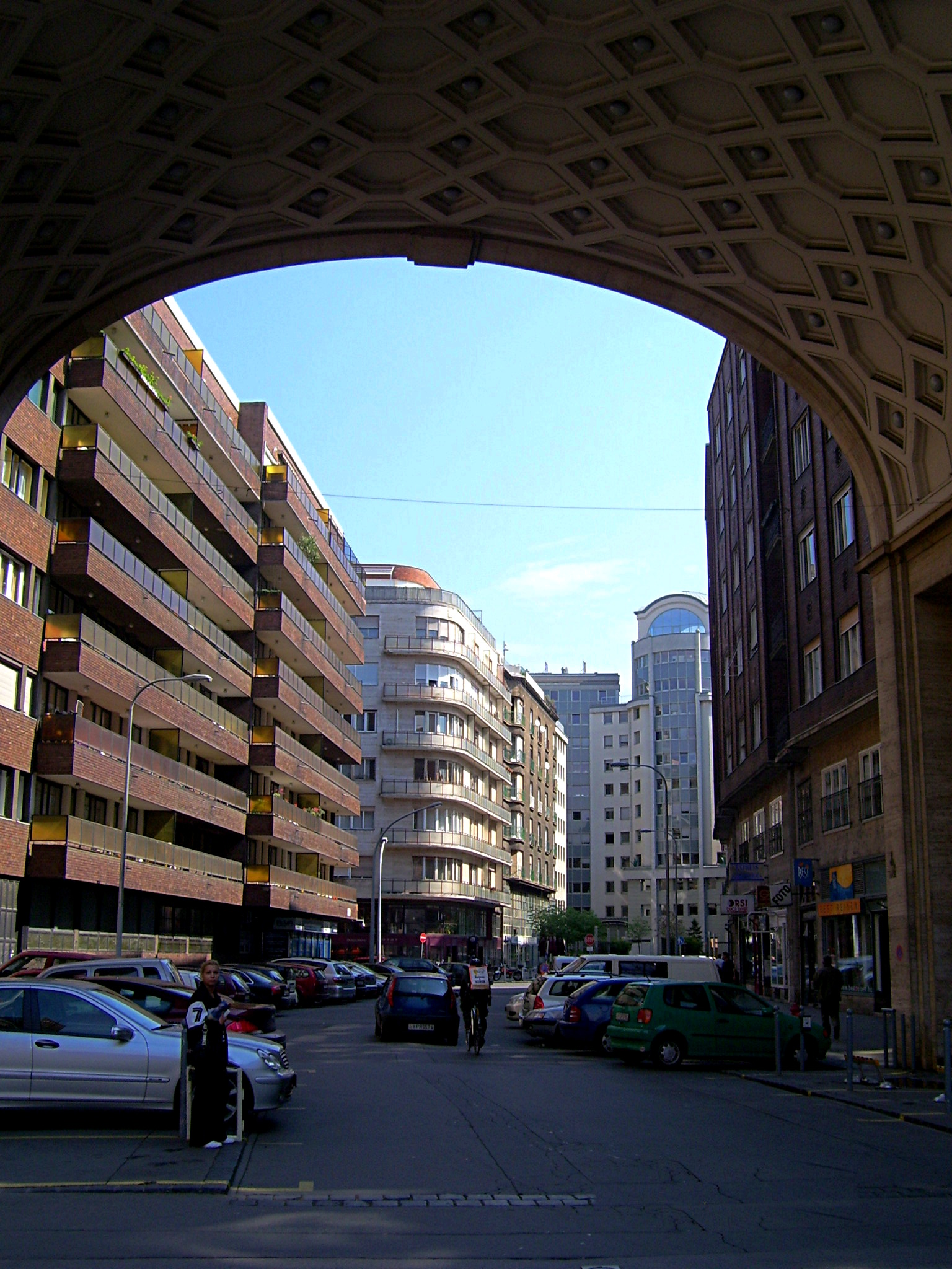 Budapest,VII.Rumbach Sebestyén utca 17 lakóház. 1941-42